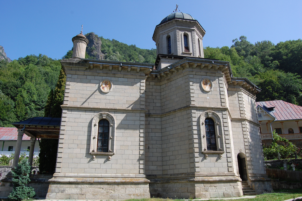 Stanisoara Monastery on Cozia Mountain 01